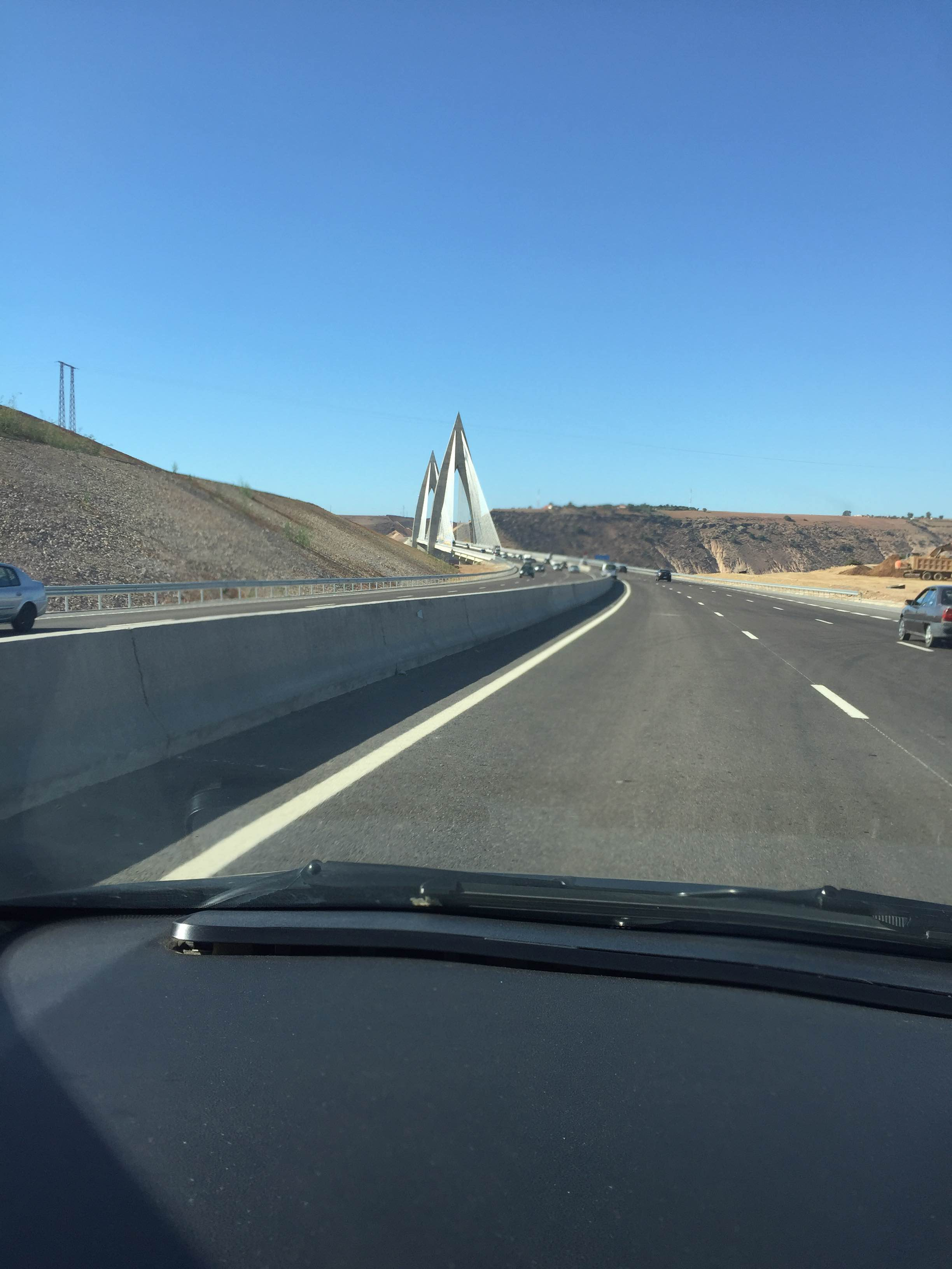 Tuibrug over de Bouregreg rivier in Rabat